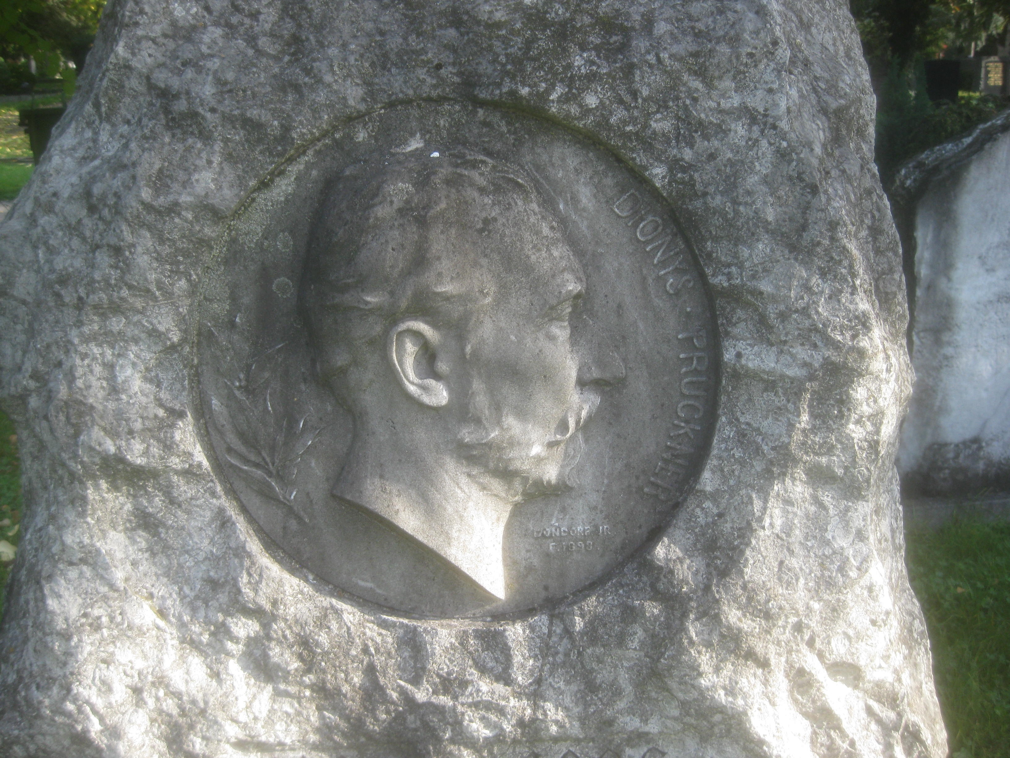 Bronzemedaillon mit Porträtrelief von Karl Donndorf, 1893. Grabstein von Dionys Pruckner auf dem Pragfriedhof in Stuttgart, Abteilung 5.